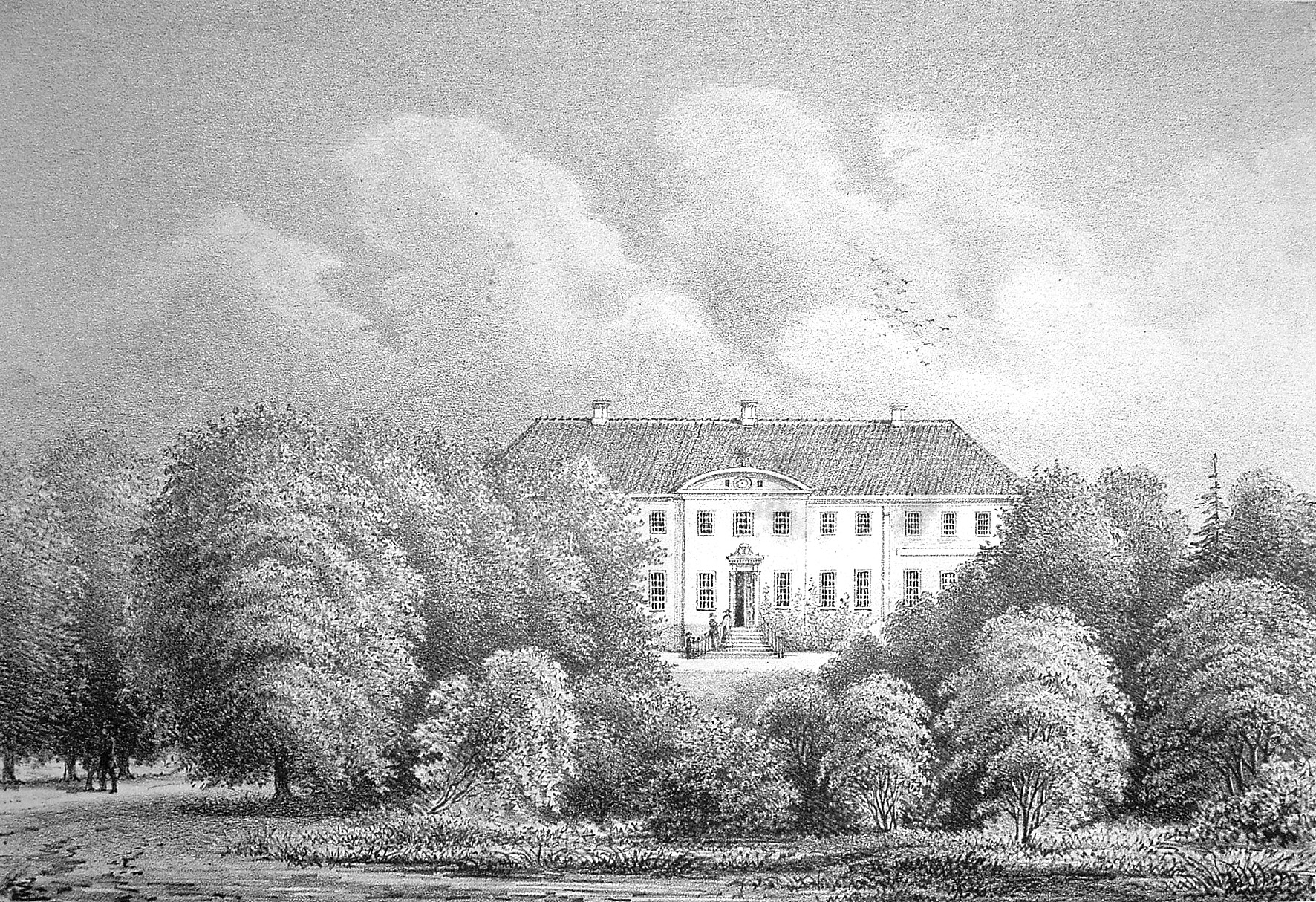 Høegholm (Høgholm) er en gammel sædegård, hvis oprindelige navn var Bjørnholm. Først i 1681 fik gården sit nuværende navn. Høegholm går helt tilbage til 1331. Gården ligger i Tirstrup Sogn i Syddjurs Kommune. Hovedbygningen er opført i 1888-1889. billedet viser den tidligere hovedbygning, den nuværende er opført i 1888-1889.